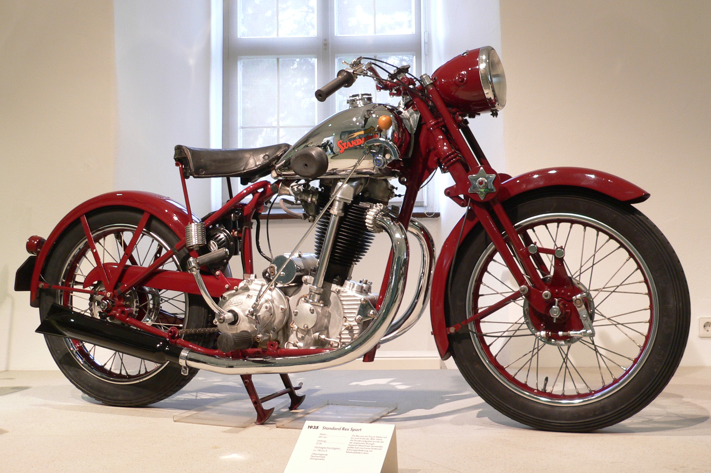 Motorbike "Standard Rex Sport" (1935) at the Deutsches Zweirad- und NSU-Museum (491 cm³, 22 PS, 130 km/h)